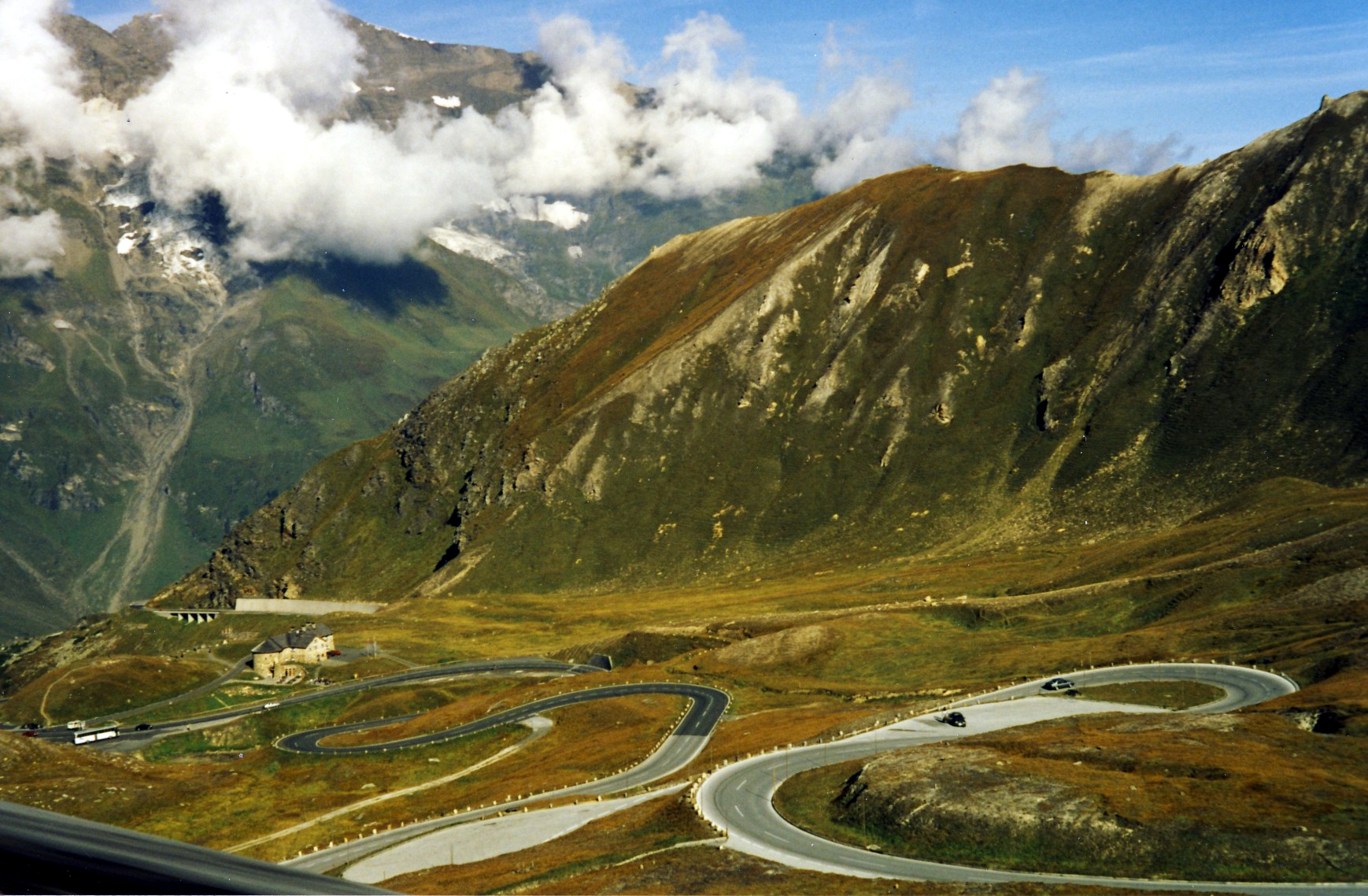 Großglockner-Hochalpenstraße, Österreich